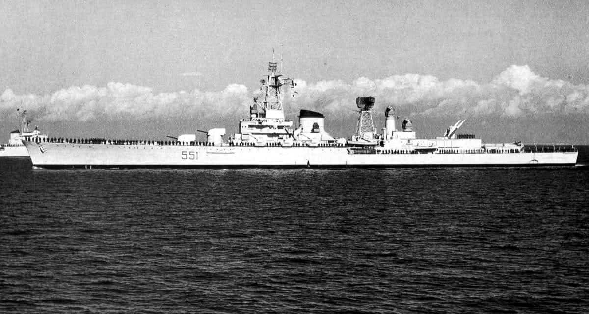 L'incrociatore Garibaldi dopo la sua ricostruzione raggiunge la sua base operativa di Taranto